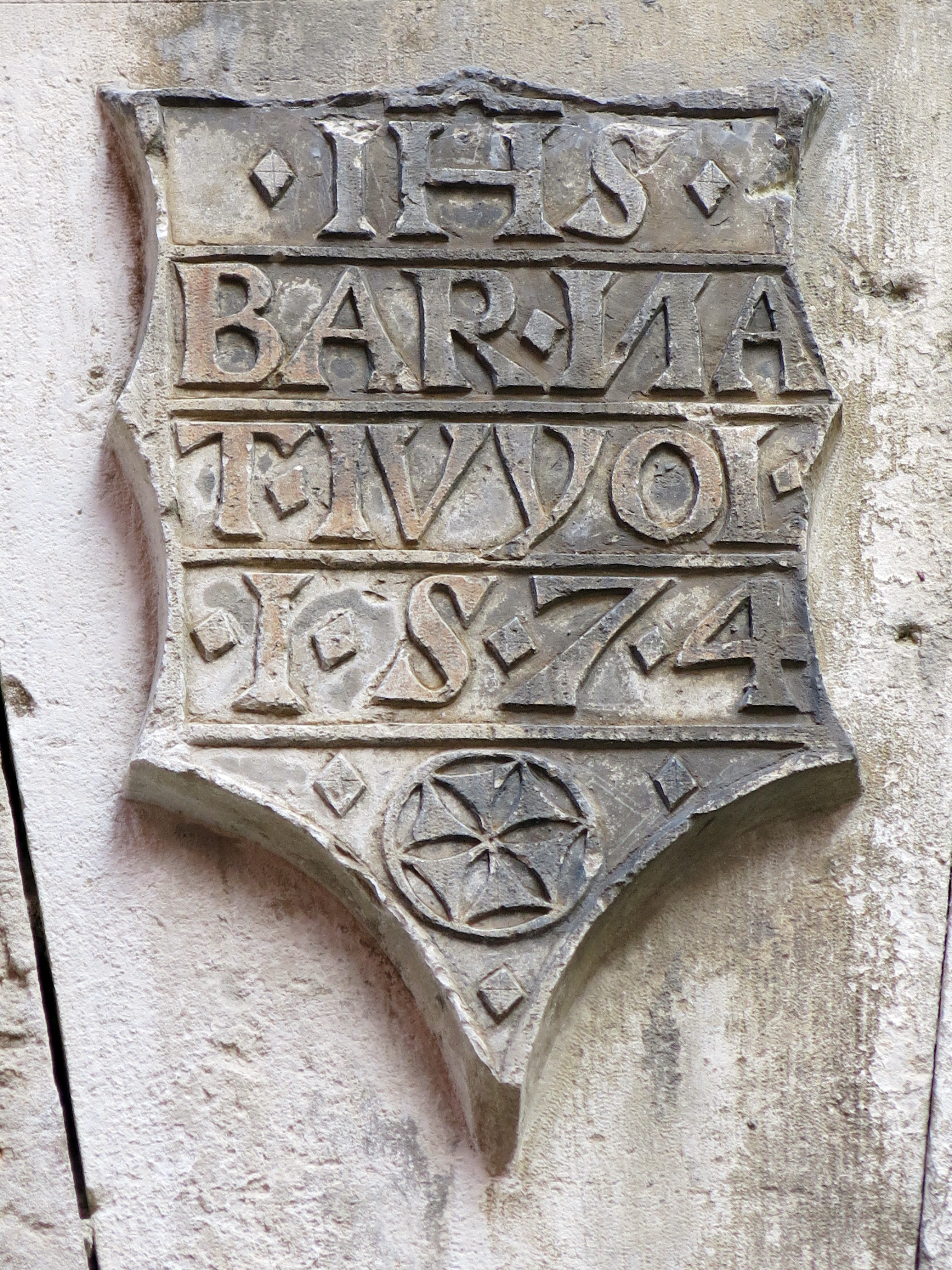 Portal adovellat rodó i escudet de l'habitatge al carrer Sant Antoni, 1 (Centelles)